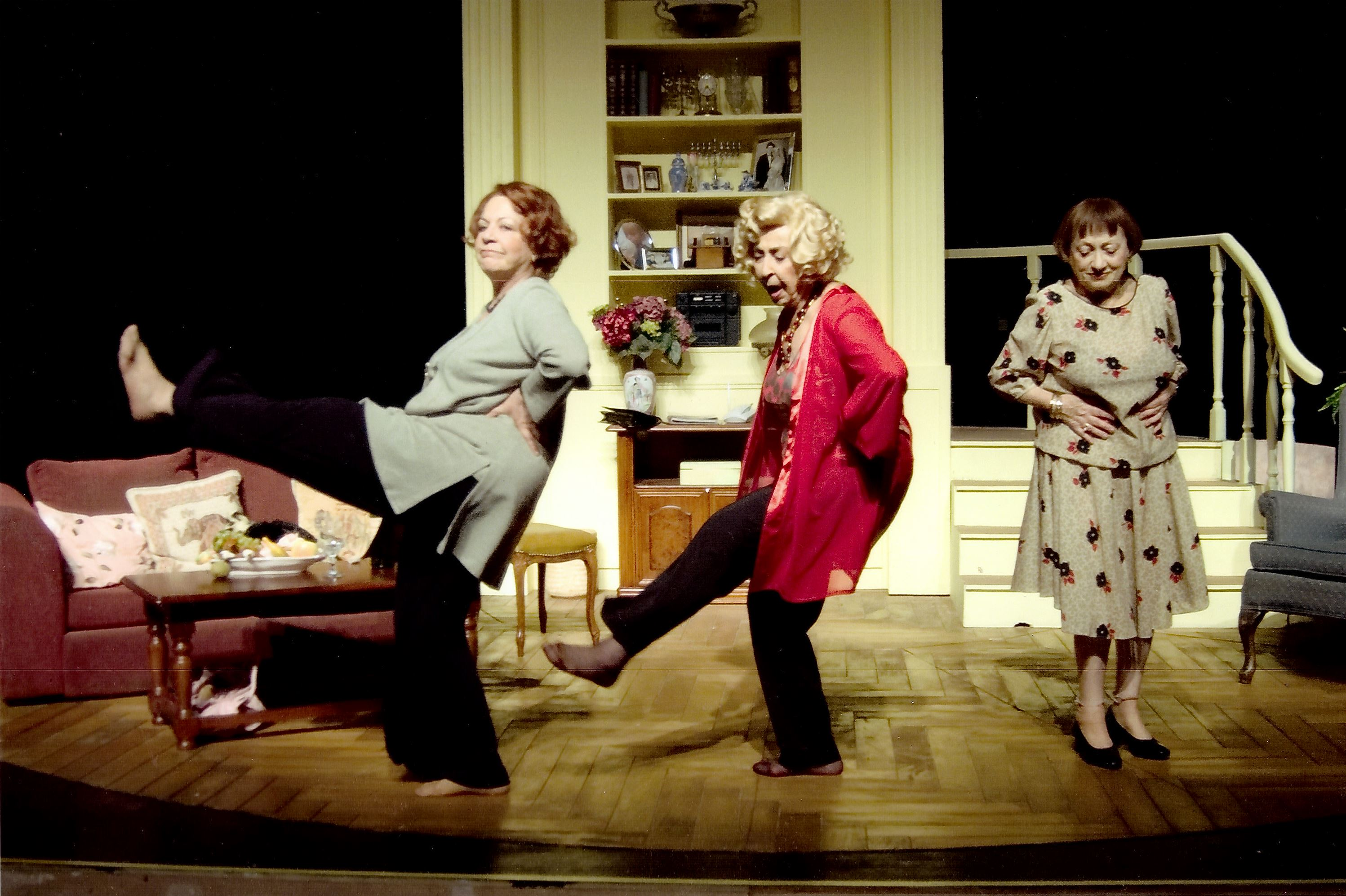 רבקה גור בתפקיד אידה בהצגה "מועדון האלמנות העליזות", לצידן של דבורה קידר וליא קניג